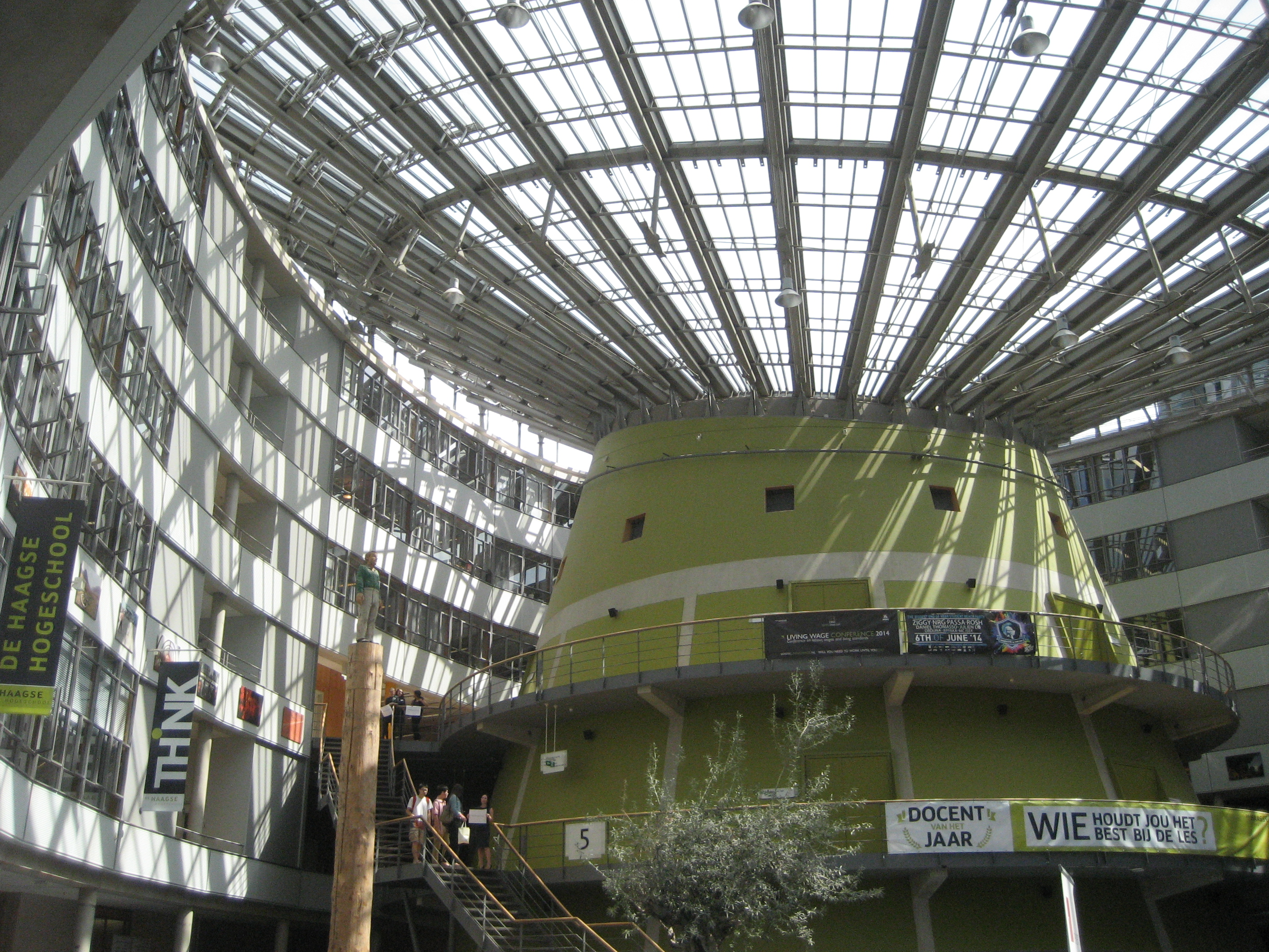 Haagse Hogeschool (Laakhaven).